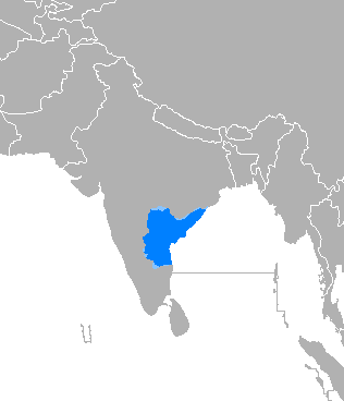 Idioma telugu.